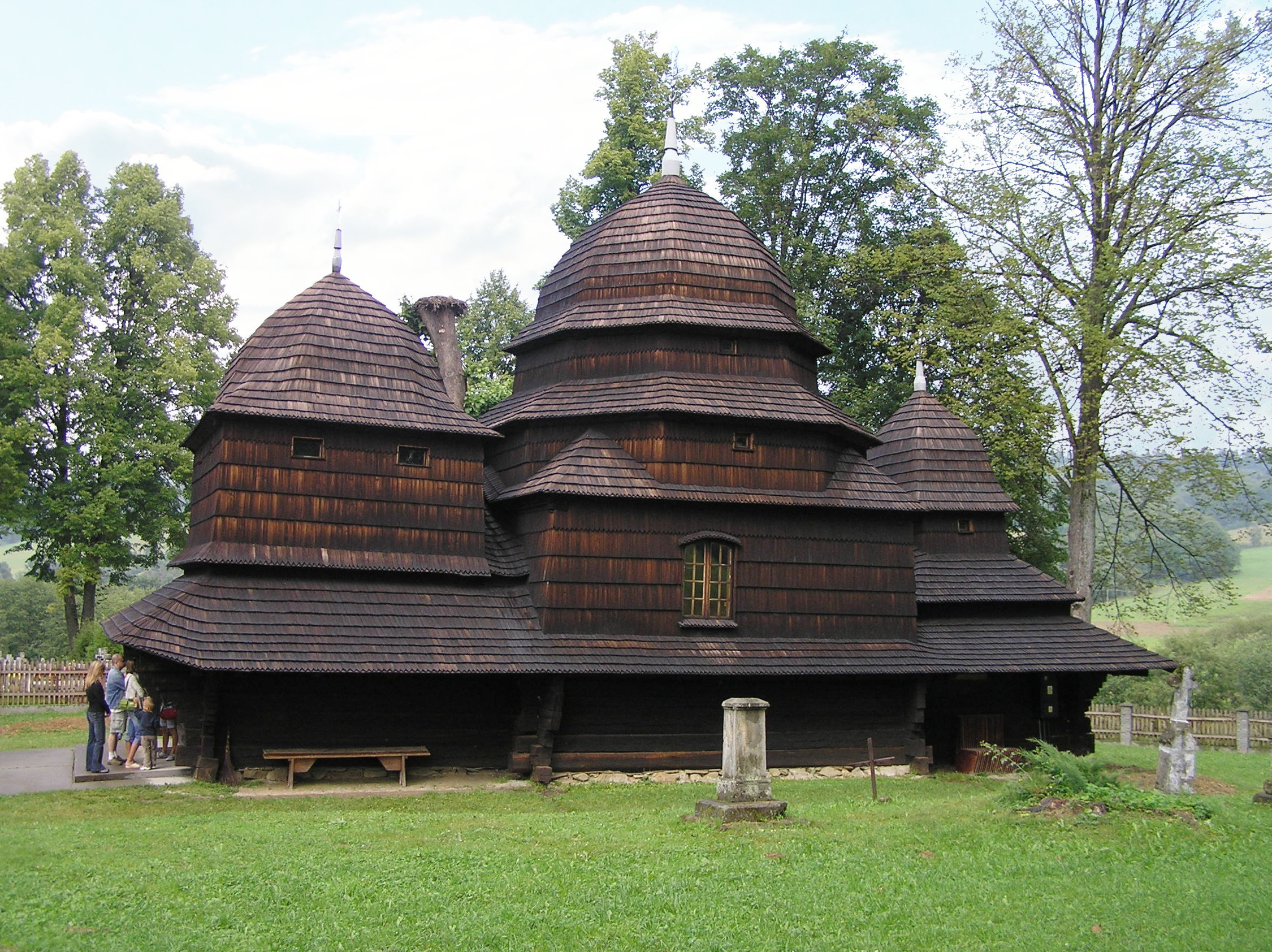 Zabytkowa cerkiew w Równi